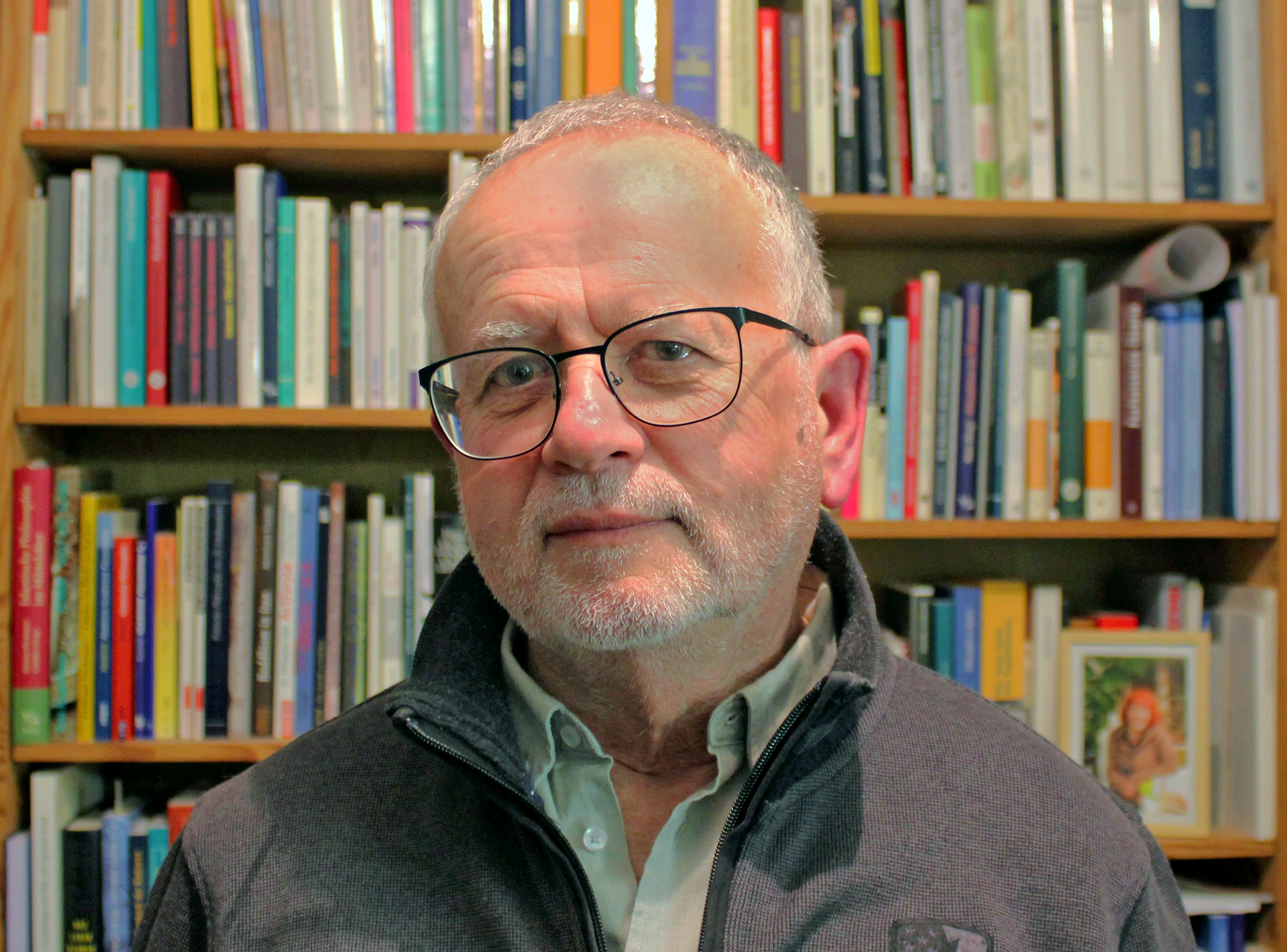 Porträt Reinhard Margreiter 2019